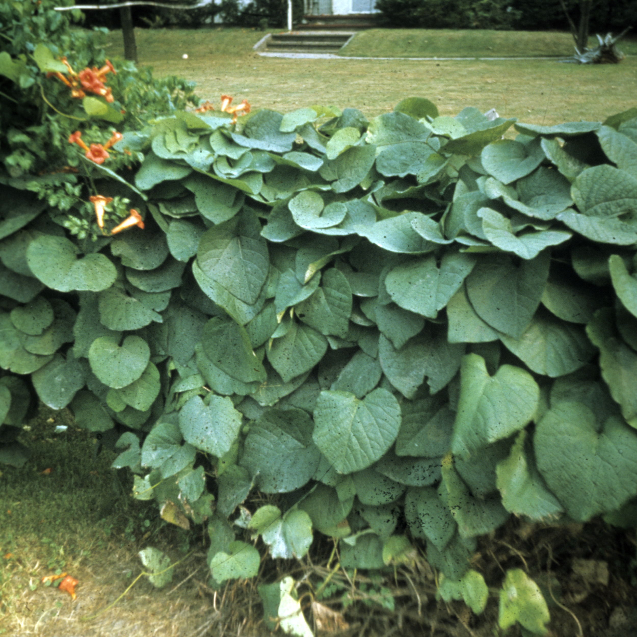 Aristolochia sipho